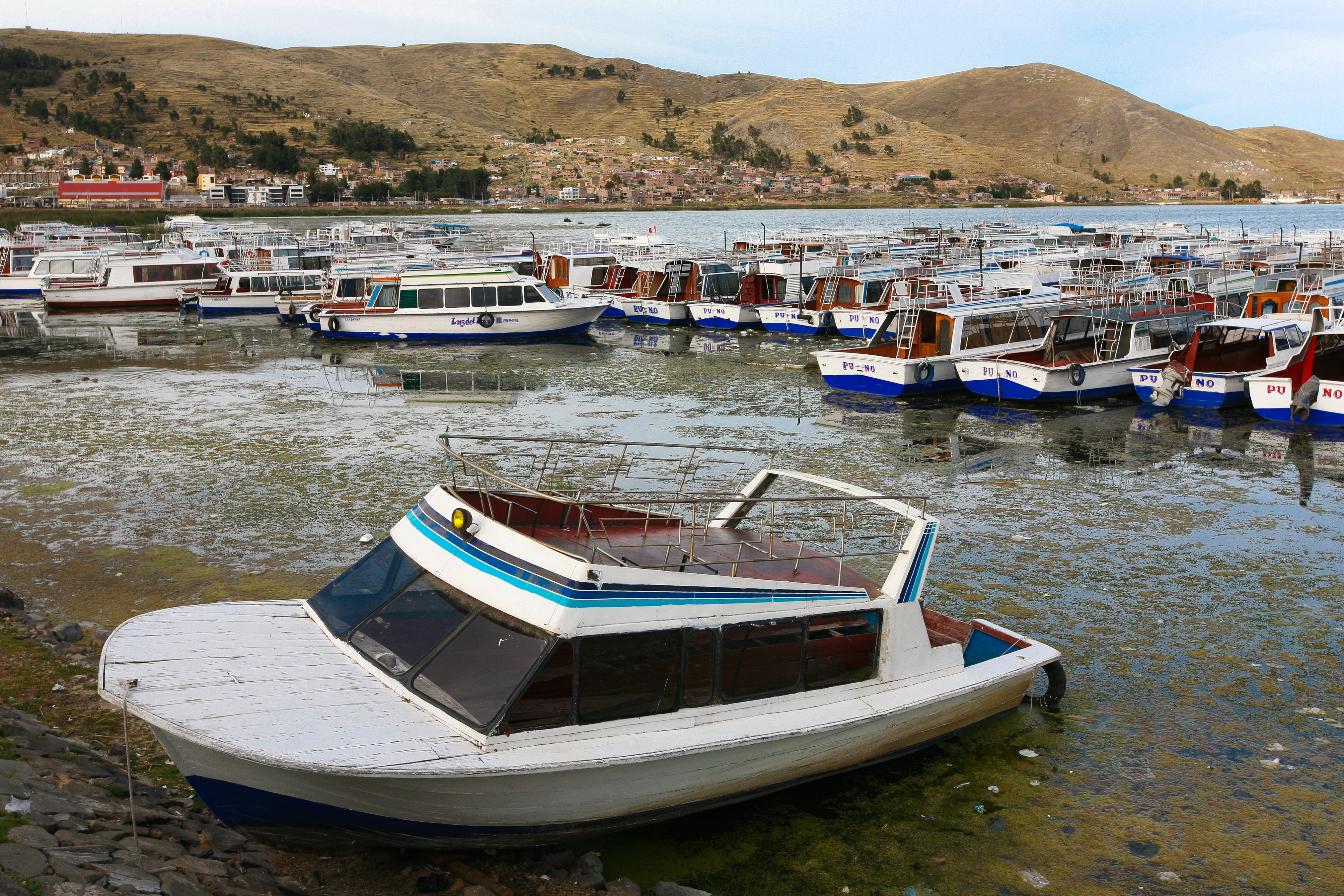 Puno Boats, Lake Titicaca